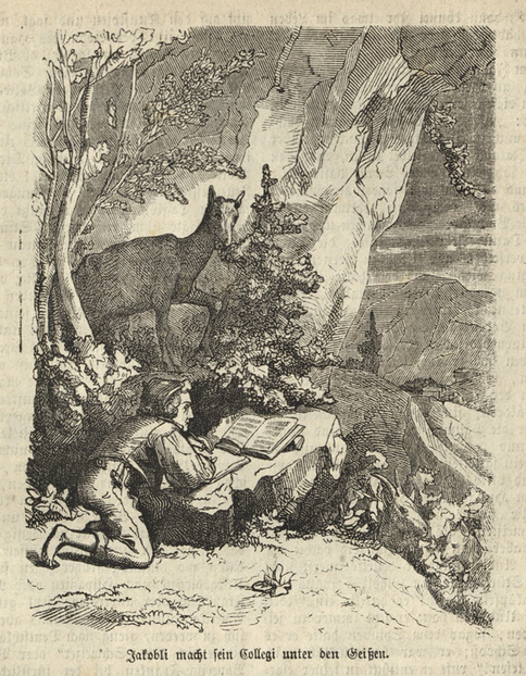 «Jakobli macht sein Collegi unter den Geißen» – der Autodidakt Jakob Joseph Matthys (Abbildung im St. Ursenkalender 1872)